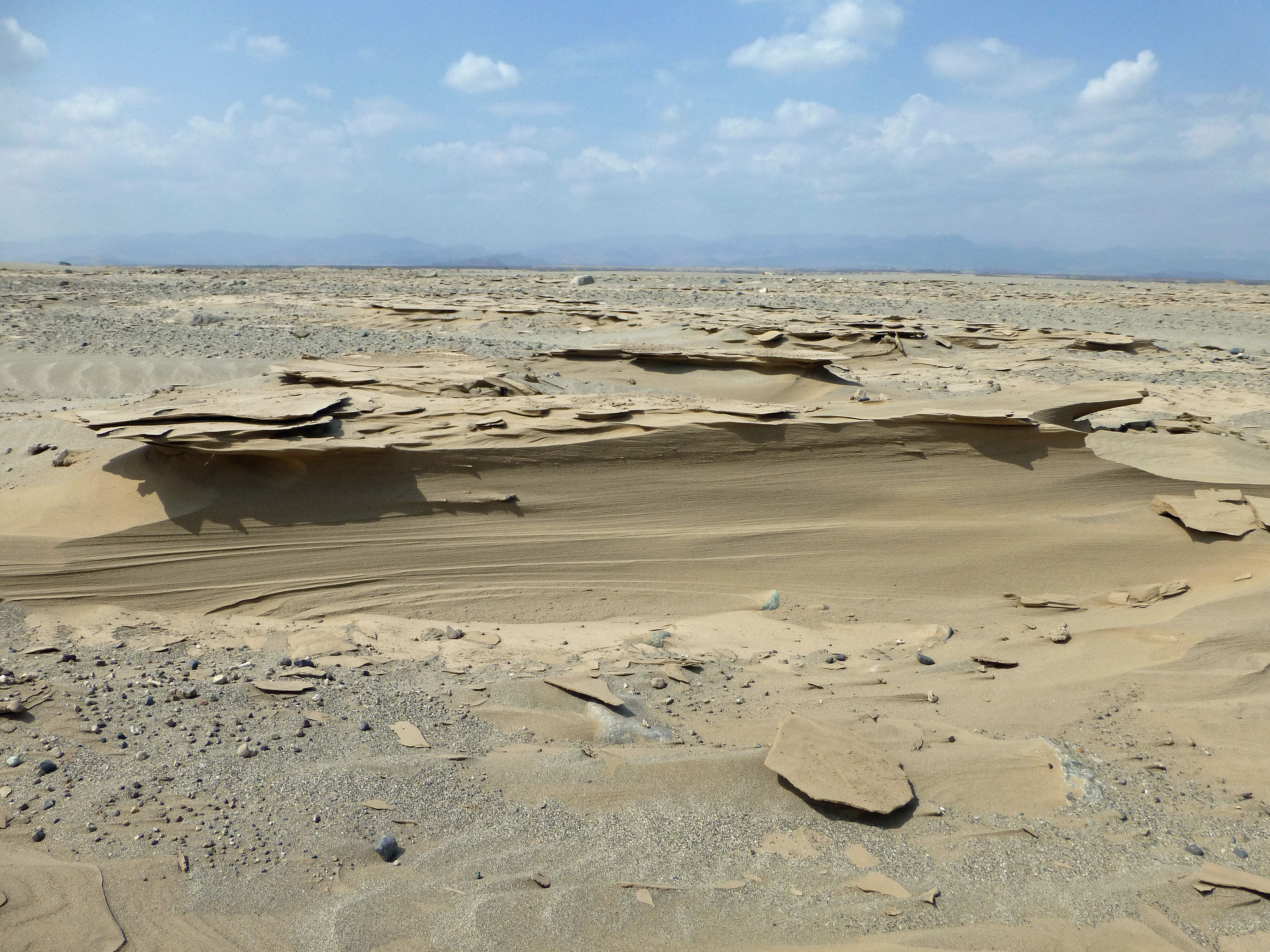 Sable dans le désert du Danakil (Ethiopie)